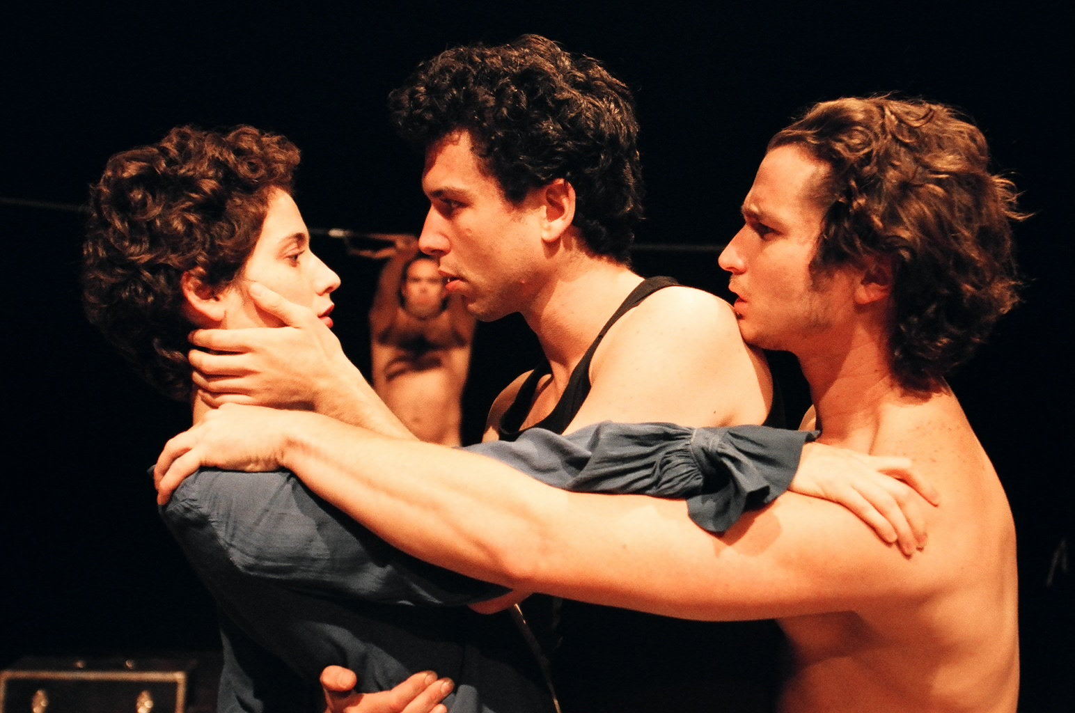 מתוך ההצגה מחזה חלום. יוני זיכהולץ, עידית נוידרפר ועודד סמו בהצגה "מחזה חלום", תיאטרון "המעבדה", 2003